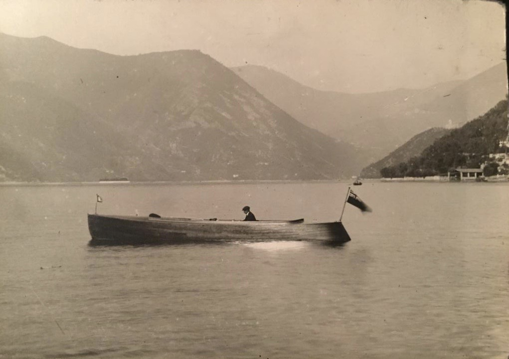 Fotografia di Sulzano degli anni '30